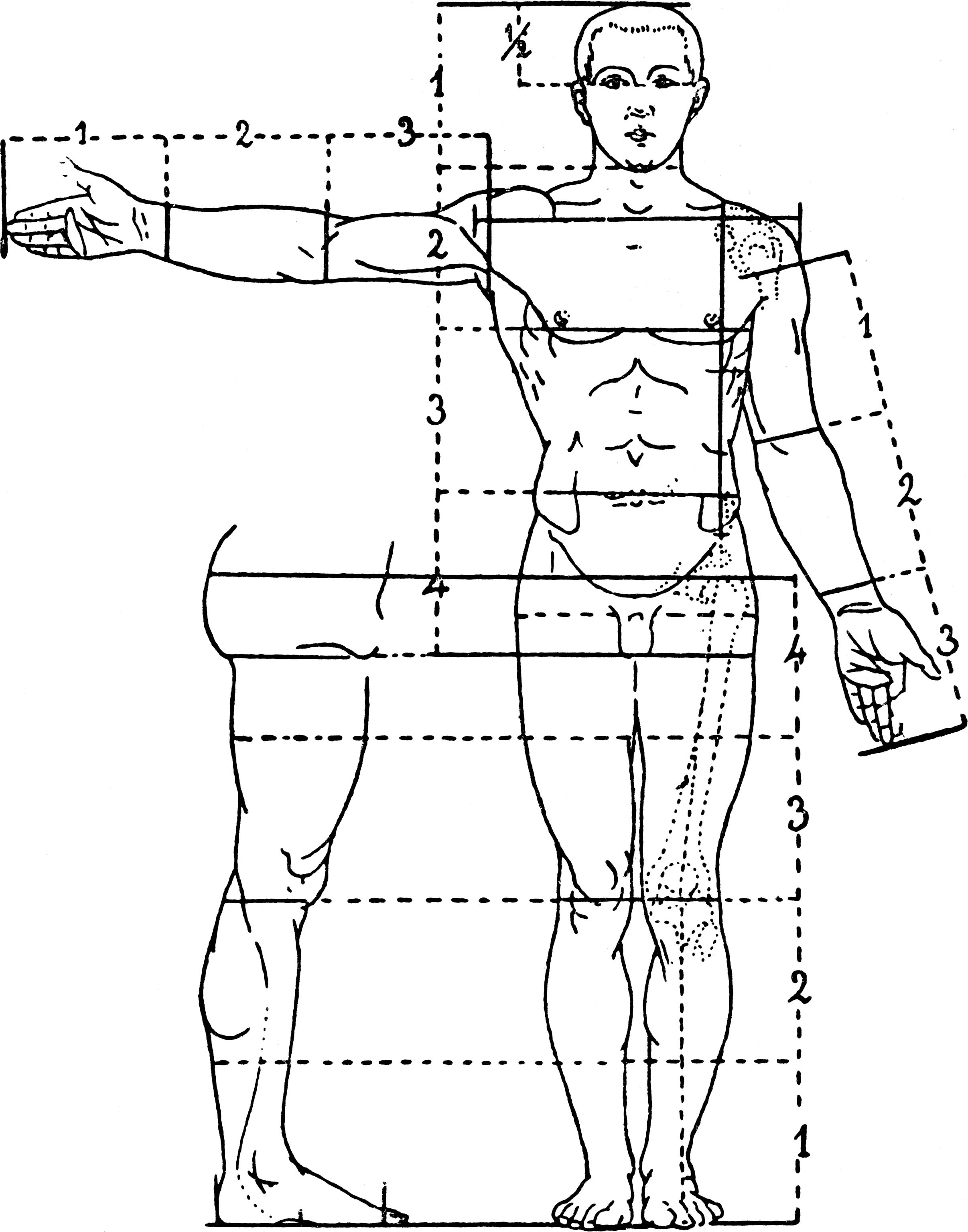 Fig. 124. — Canon de M. Paul Richer